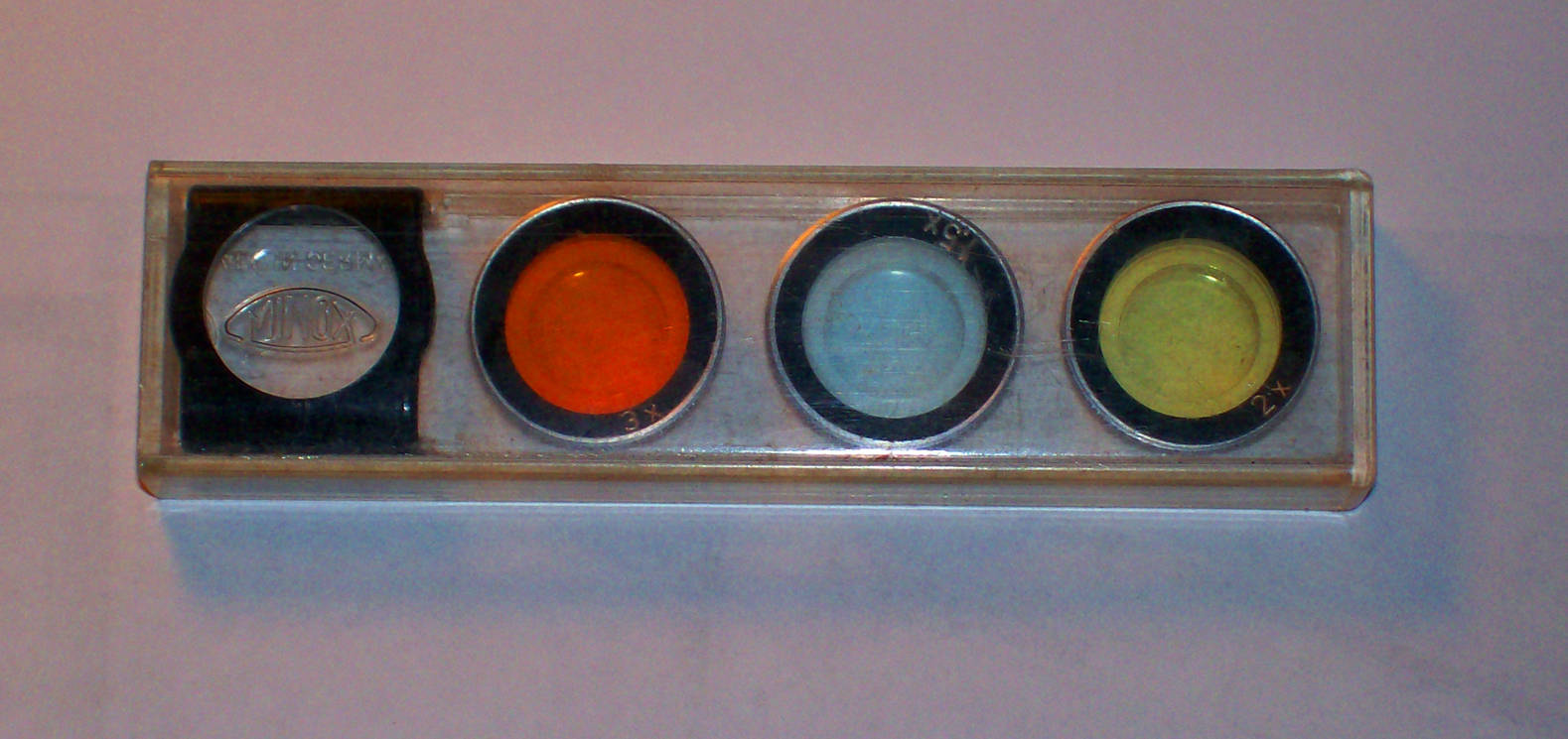 Minox color filter set